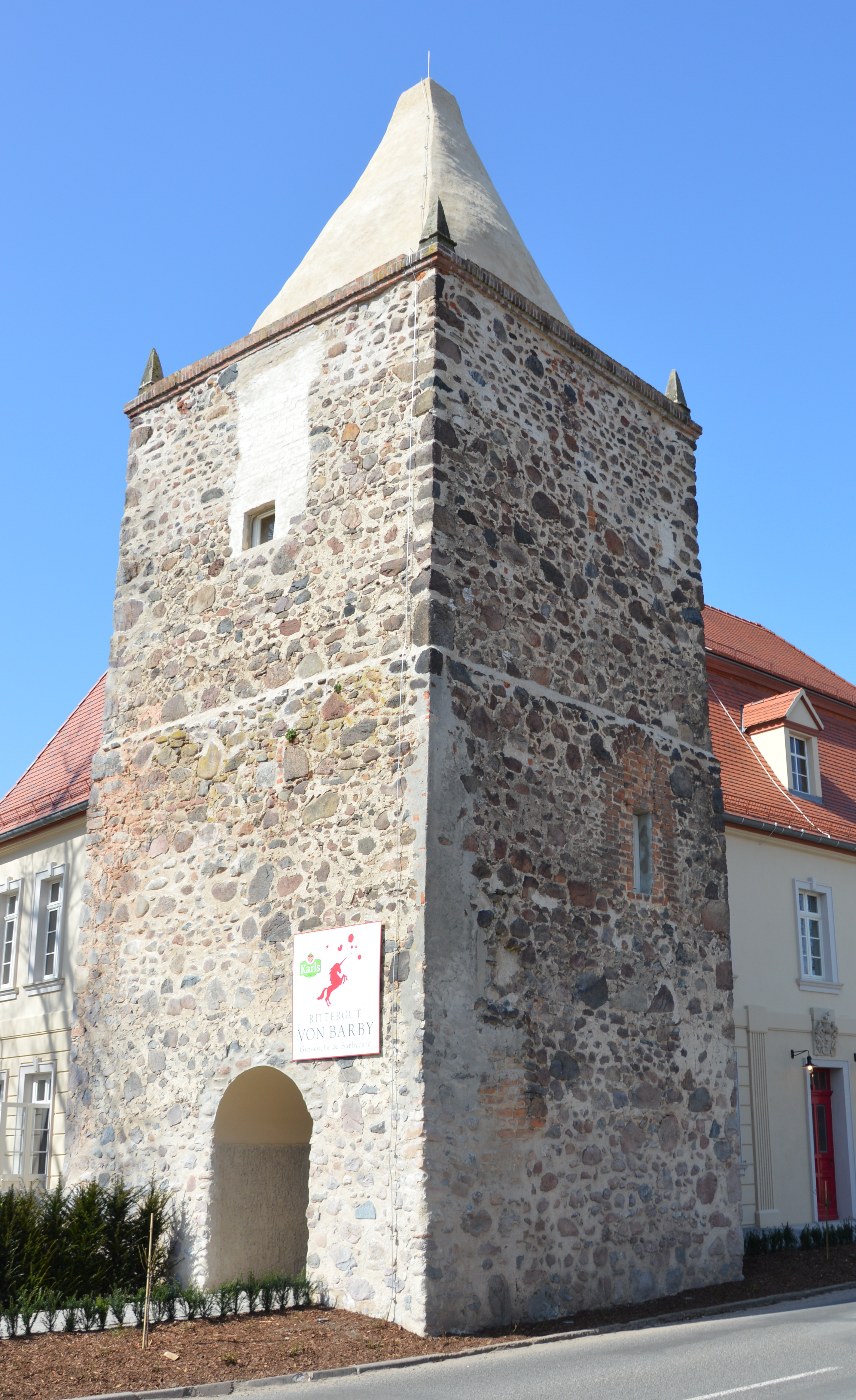 Münchentorturm